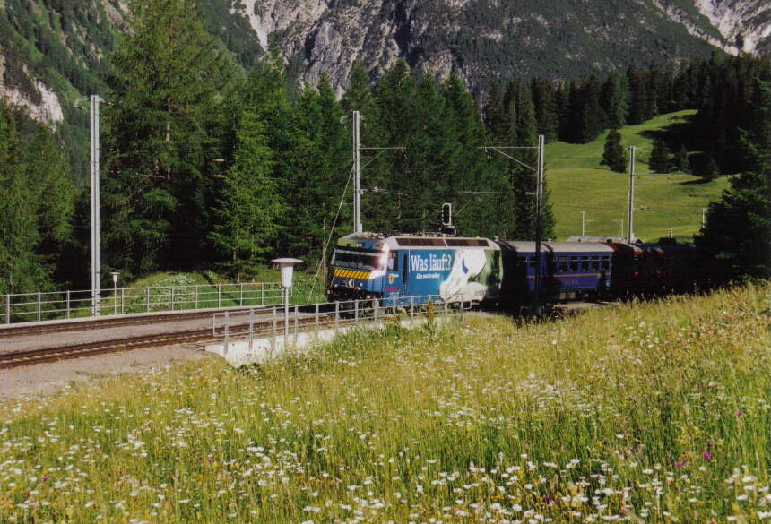 RhB-Zug am de:22. Juni de:2003 kurz vor Preda. Zuglok ist eine Ge 4/4 III. Steffen Mokosch